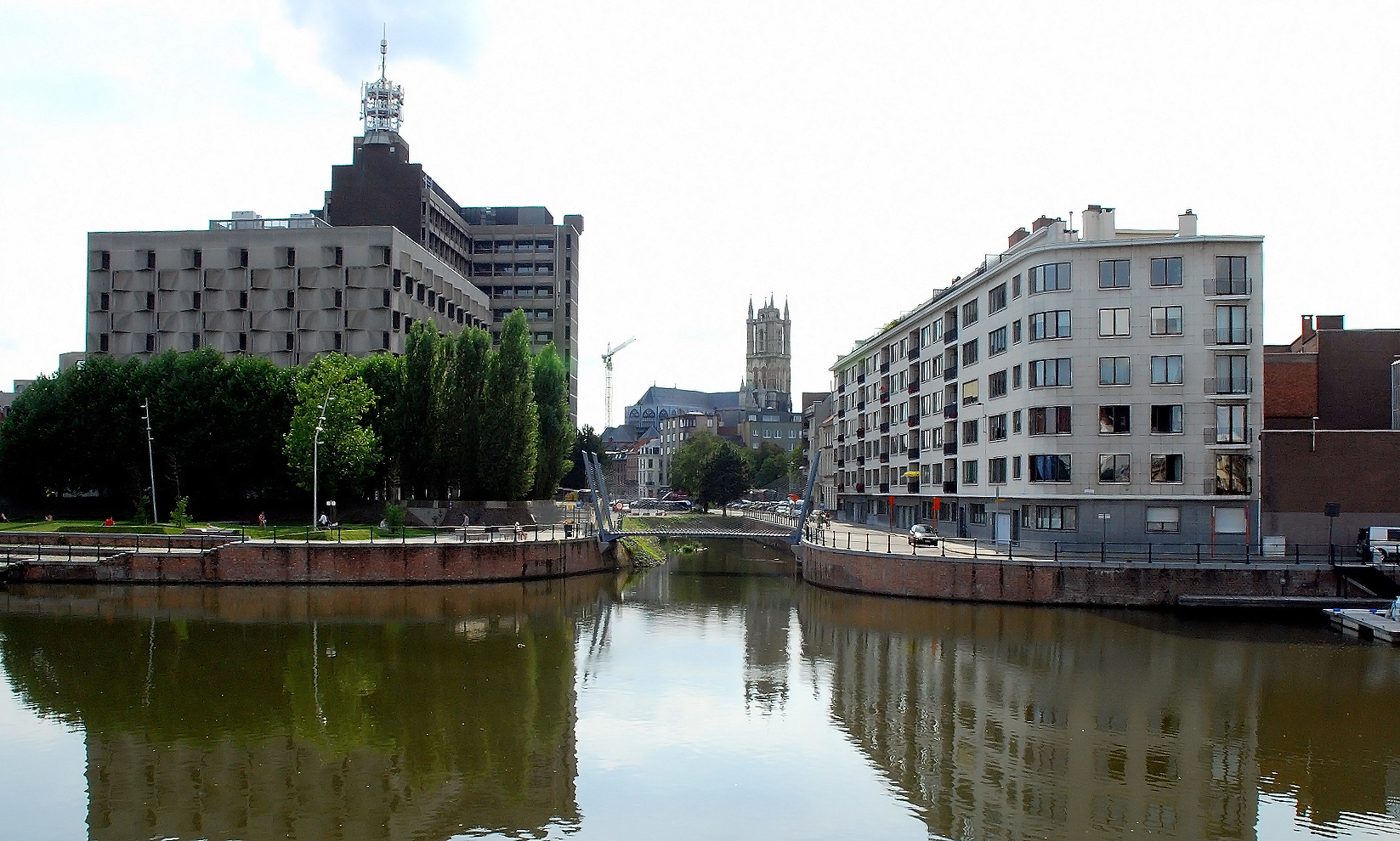 De Bavobrug te Gent, België